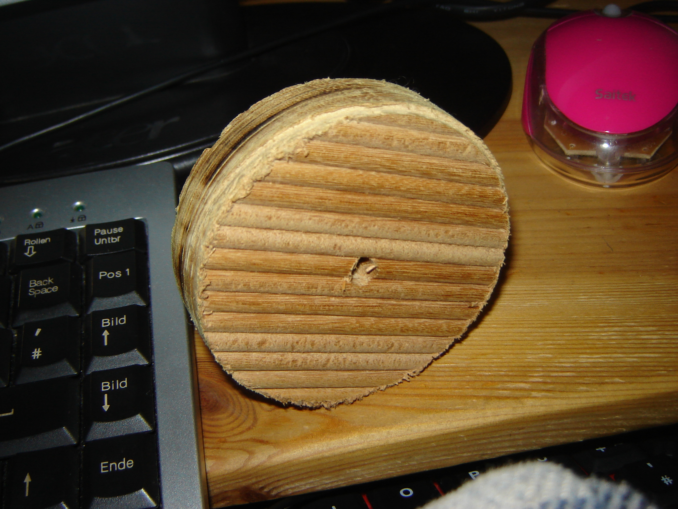 Ein rundes Stück Garapa-Holz (Abfall von einem Tisch)